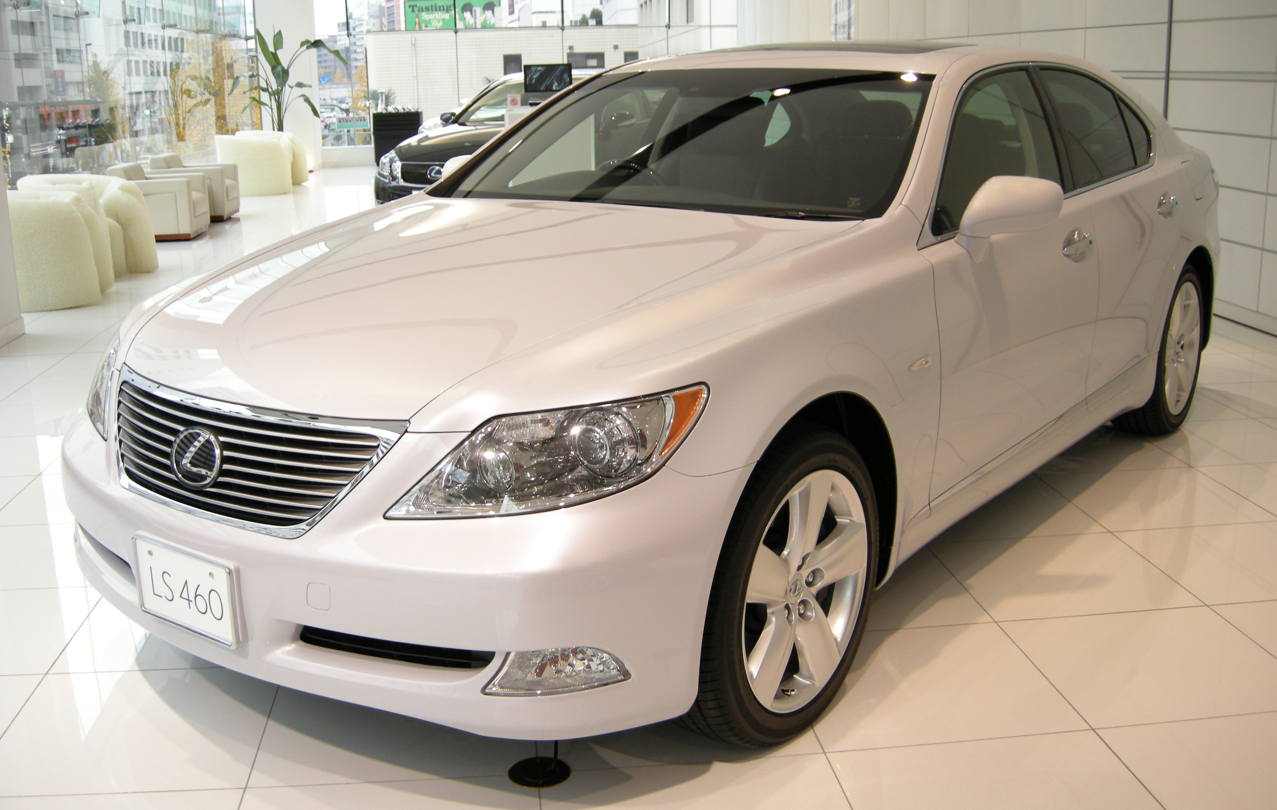 Lexus LS460 in Lexus Gallery Takanawa (Minato, Tokyo)